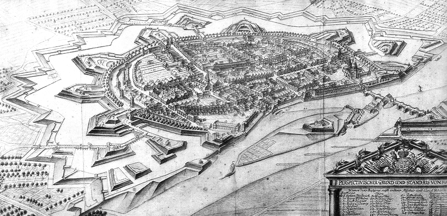 Hannoversche Landesfestung Hameln